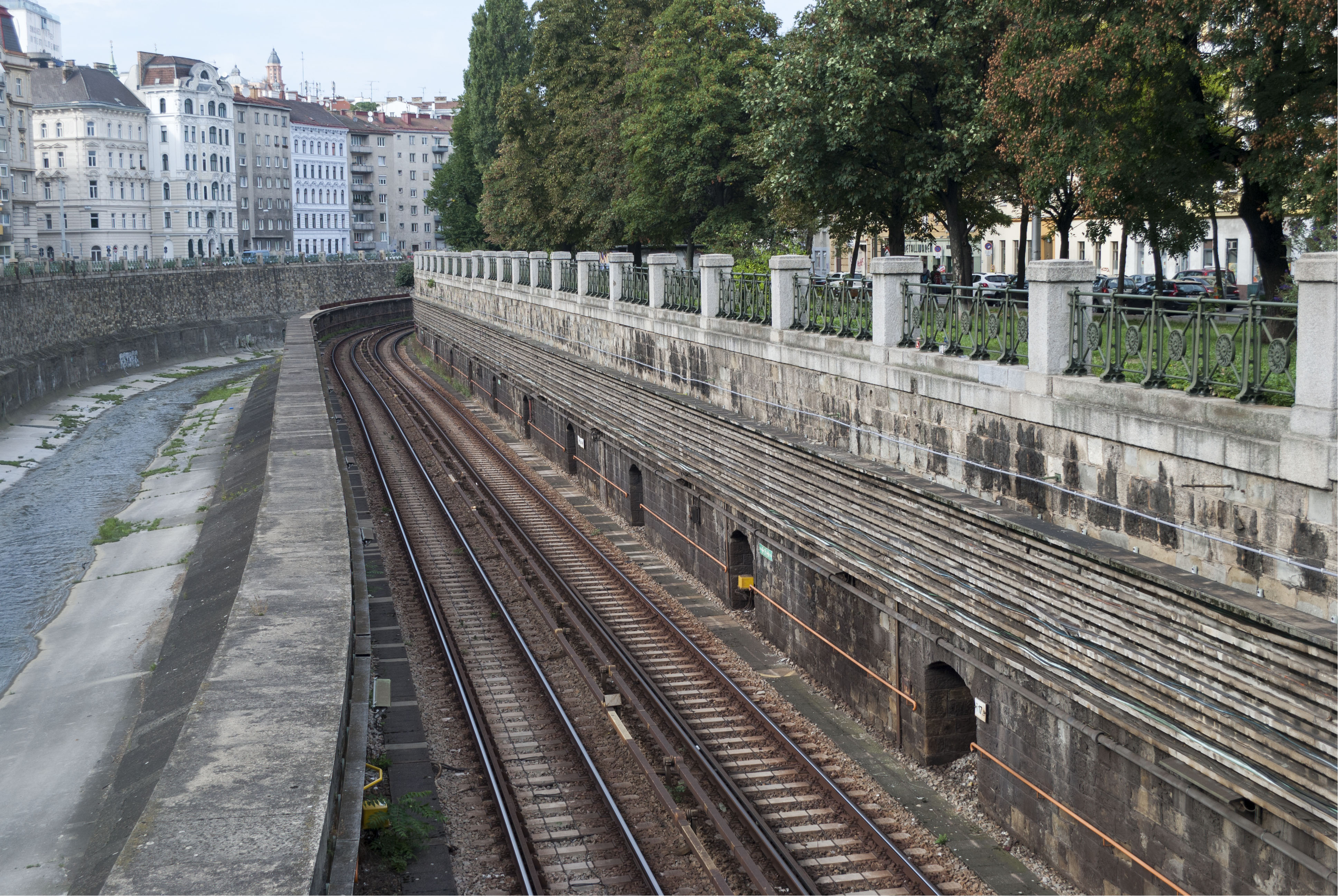 ehem. Stadtbahn - Teilbereich der heutigen U4